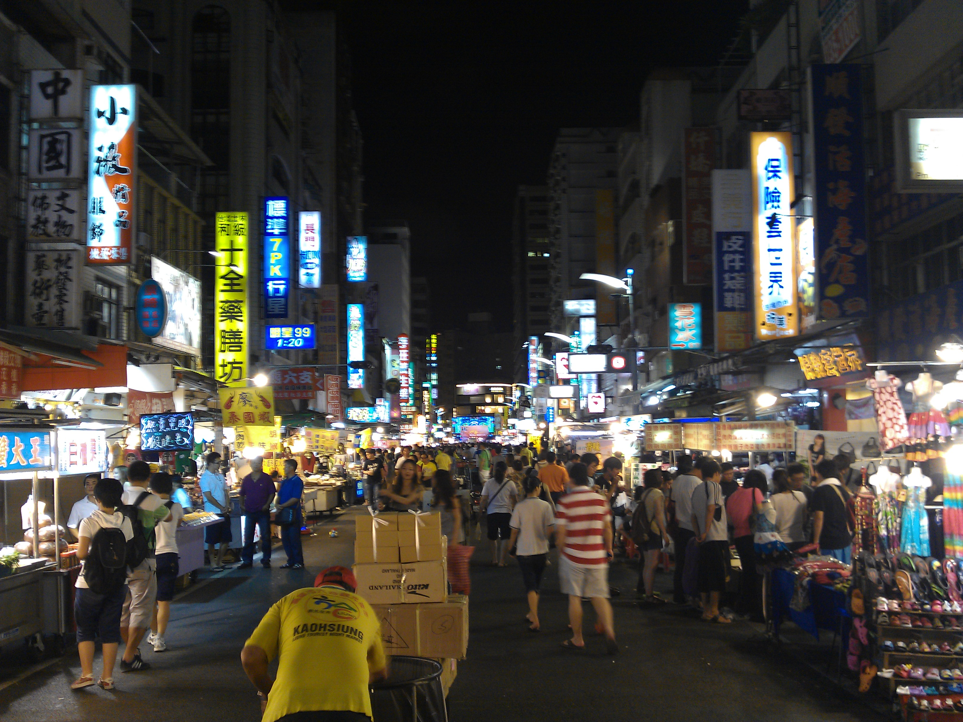 高雄六合夜市